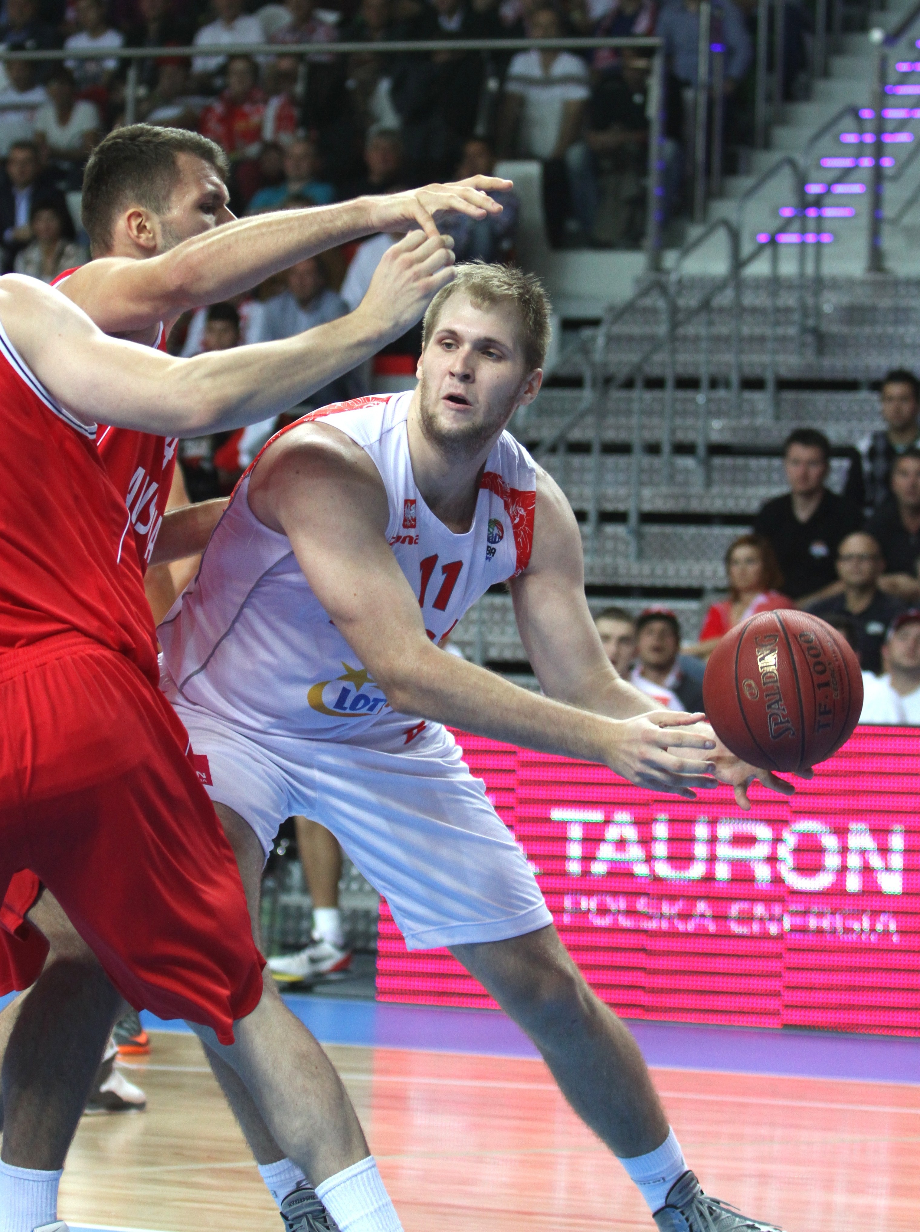 Eliminacje do EuroBasketu 2015: Polska – Austria, Lubin, 27 sierpnia 2014. Przemysław Karnowski